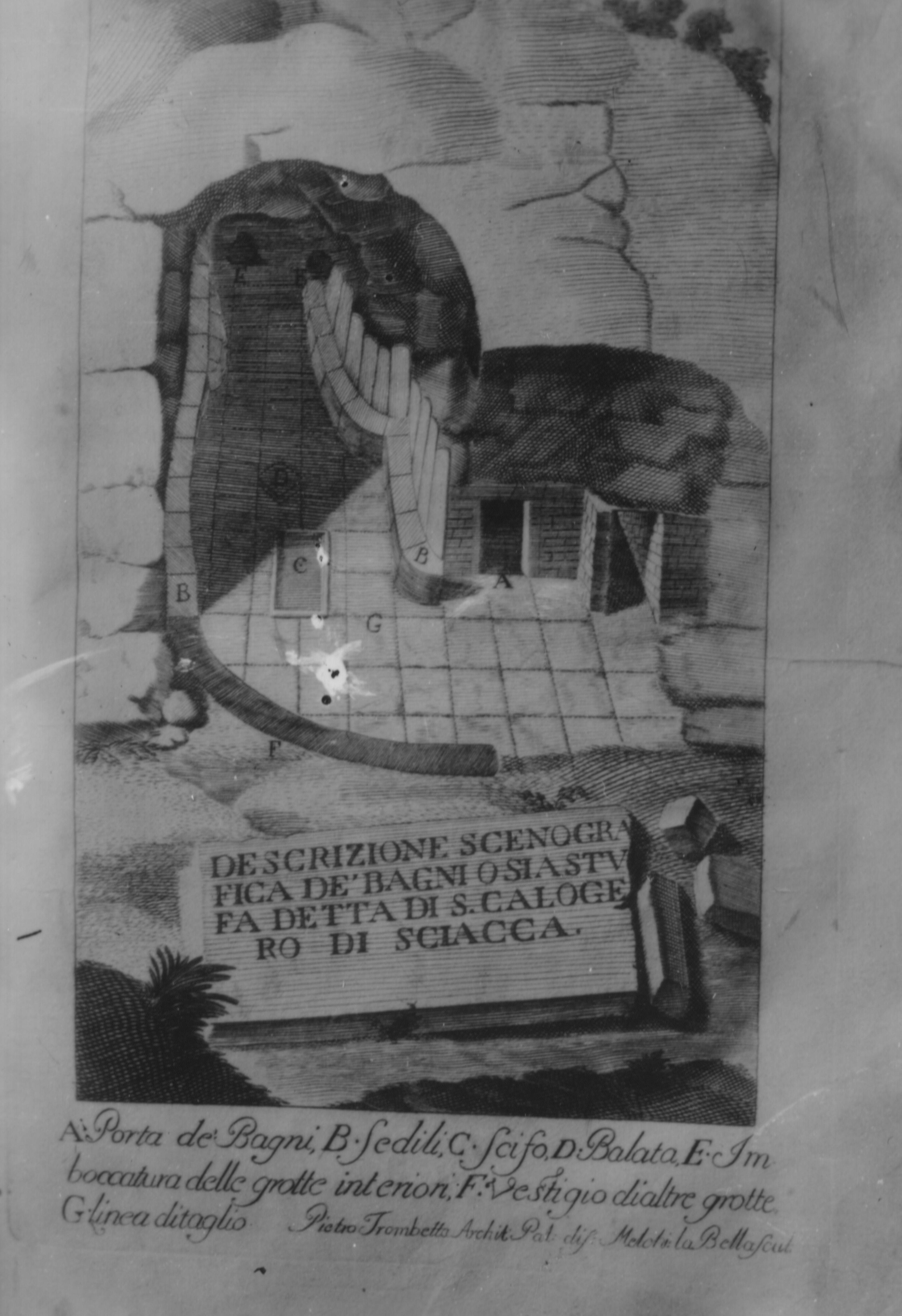 Descrizione scenografica de' bagni o sia stufa detta di San Calogero di Sciacca, incisione settecentesca.